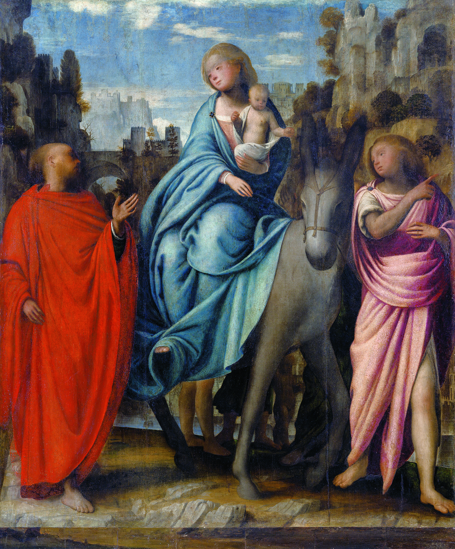 di orselina